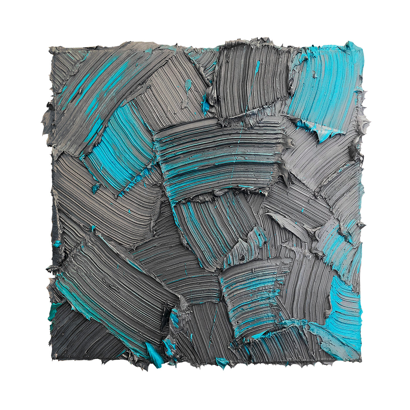 Huile sur toile